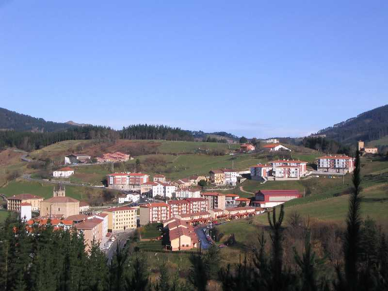 Vista de Mallabia, Vizcaya, País Vaco, España.